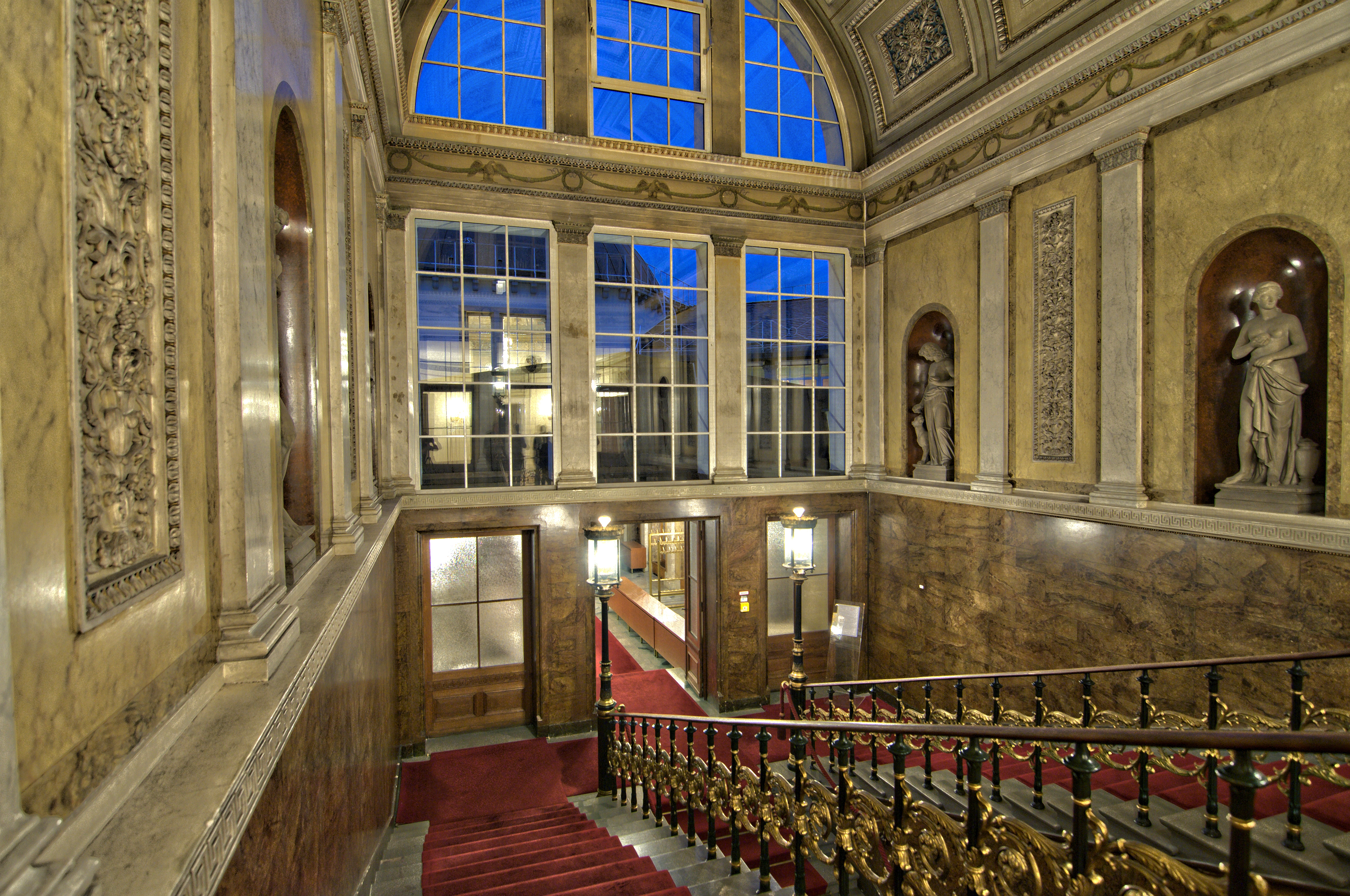 Stadtschloß Wiesbaden Wikipedia im Landtag – Hessen 26.–28. Februar 2013 in Wiesbaden Fragen zur Nachnutzung Wenn Sie Fragen zur Nachnutzung dieses Bildes haben, können Sie sich jederzeit gern an wenden